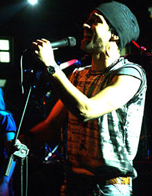 John Paul Ospina cantando con DaGoske en el evento de Puro Gold, en ColombiaModa 2006